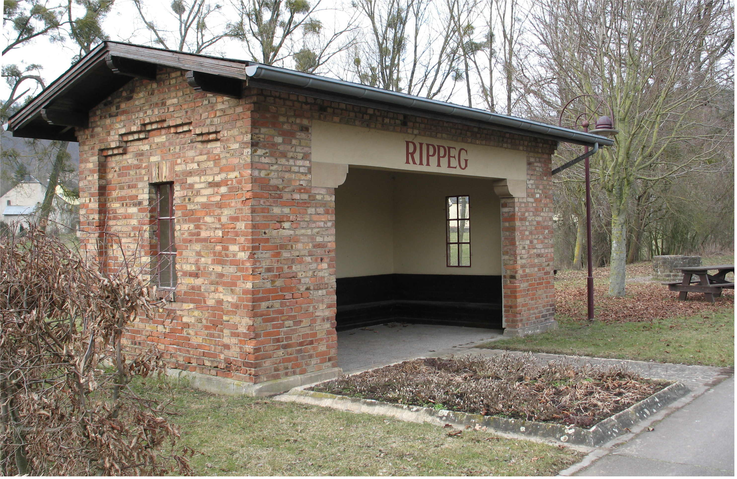 Rippeg (Mäerz 2006)